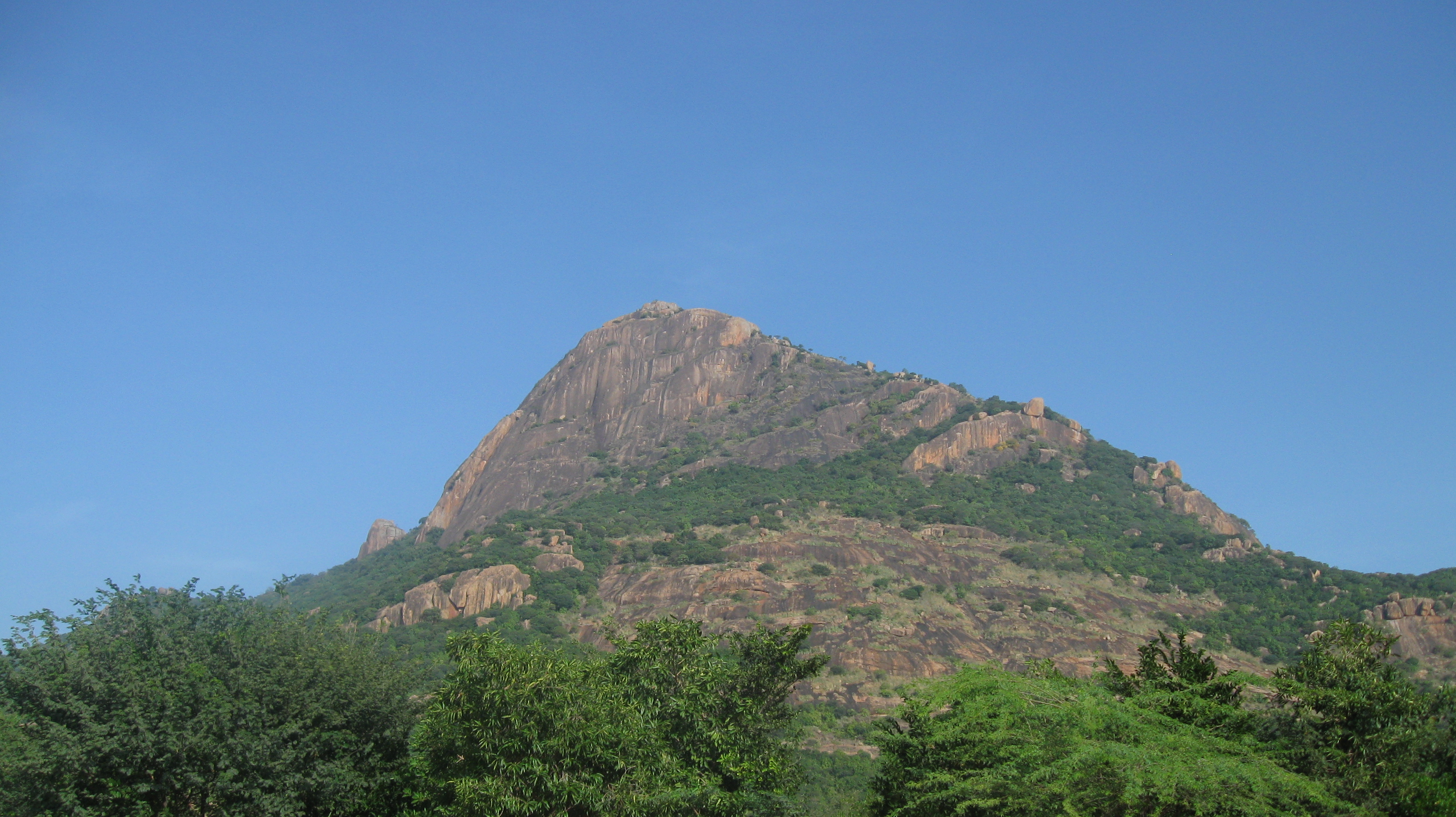 பாரி ஆண்ட பறம்பு மலையின் மற்றொரு தோற்றம்.